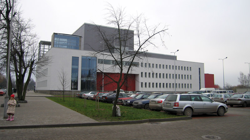 Marijampolė Culture palace